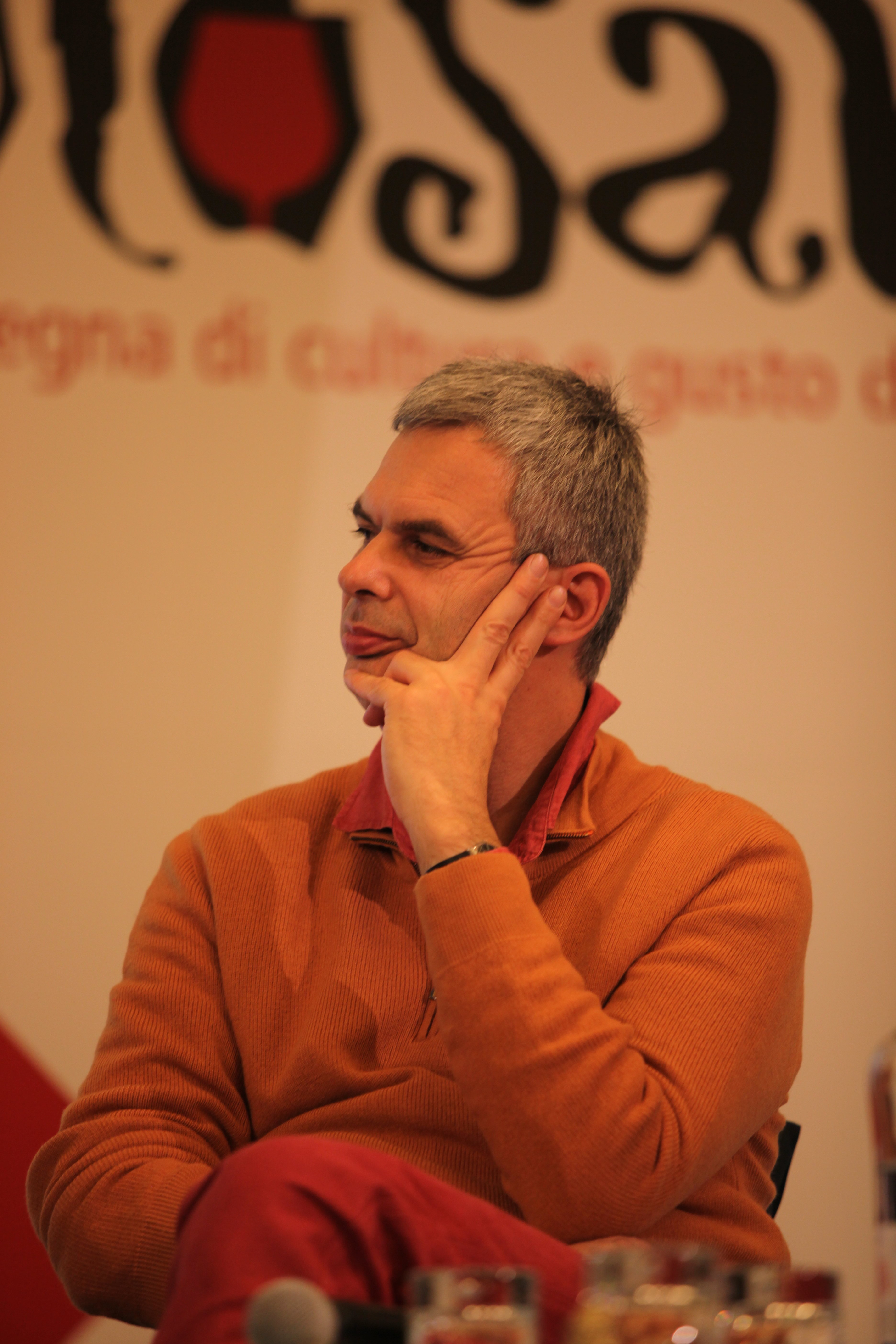 Pietro Leemann, Golosaria, Milano, 2011